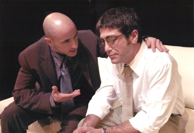 ההצגה החיים בשלוש גרסאות